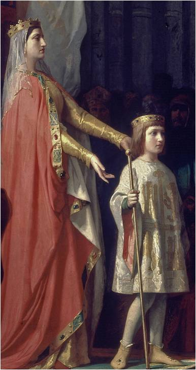 La reina María de Molina y su hijo, Fernando IV de Castilla. Detalle del cuadro titulado María de Molina presenta a su hijo Fernando IV en las Cortes de Valladolid de 1295.